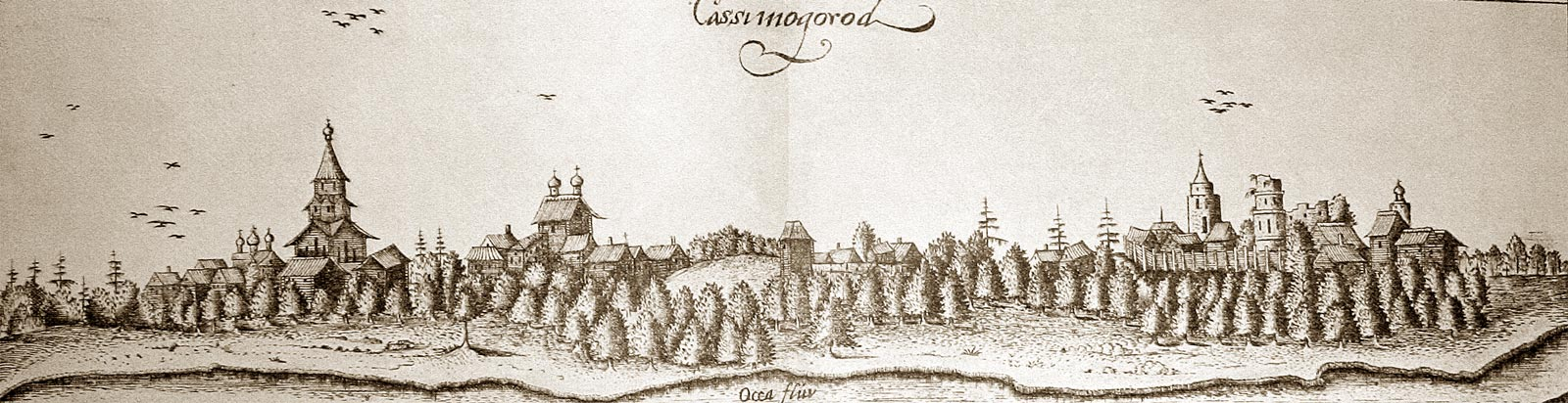 Касимов